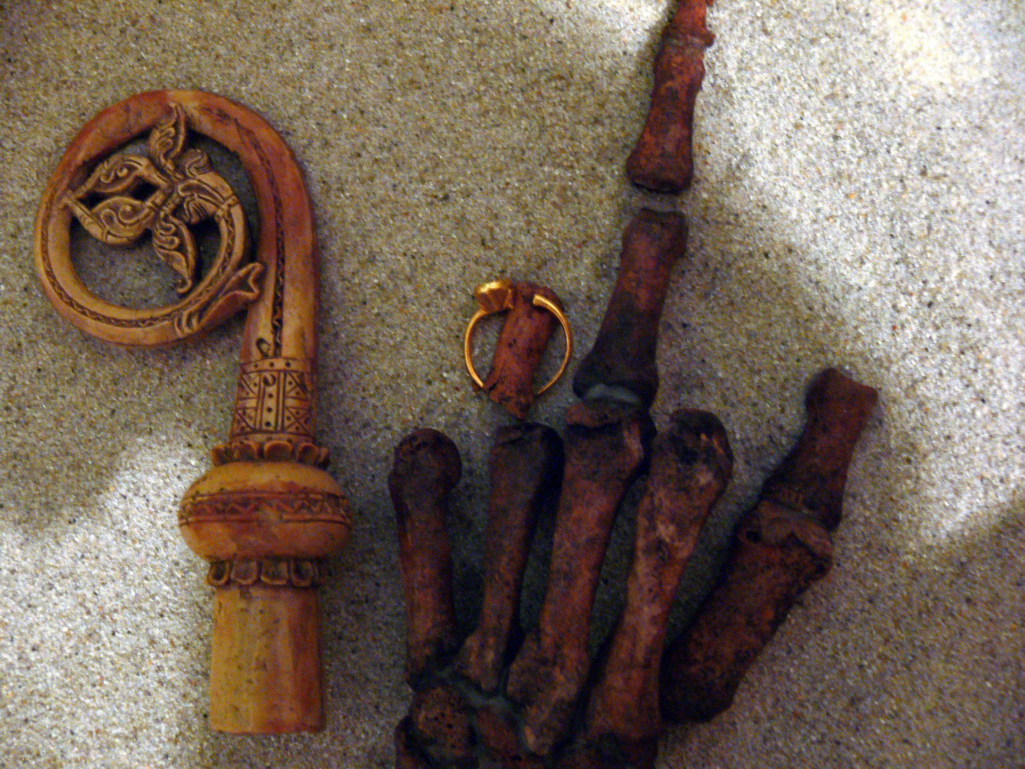 Bischofsstab und Bischofshand mit Ring aus Garðar (Grönland). Der Bischof selbst wurde wieder nach Grönland verbracht.